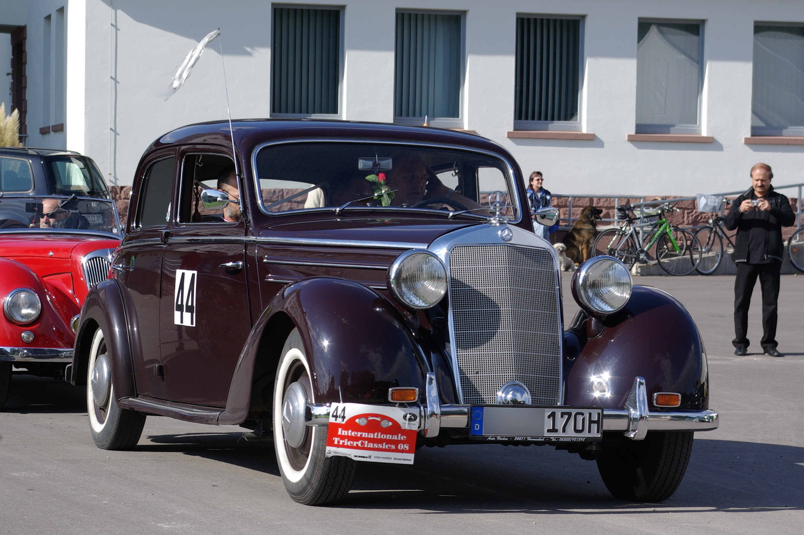 Mercedes Benz 170 W 136 Baujahr 1950